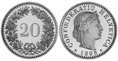 0.20 CHF 1995 / Zwanzigrappen